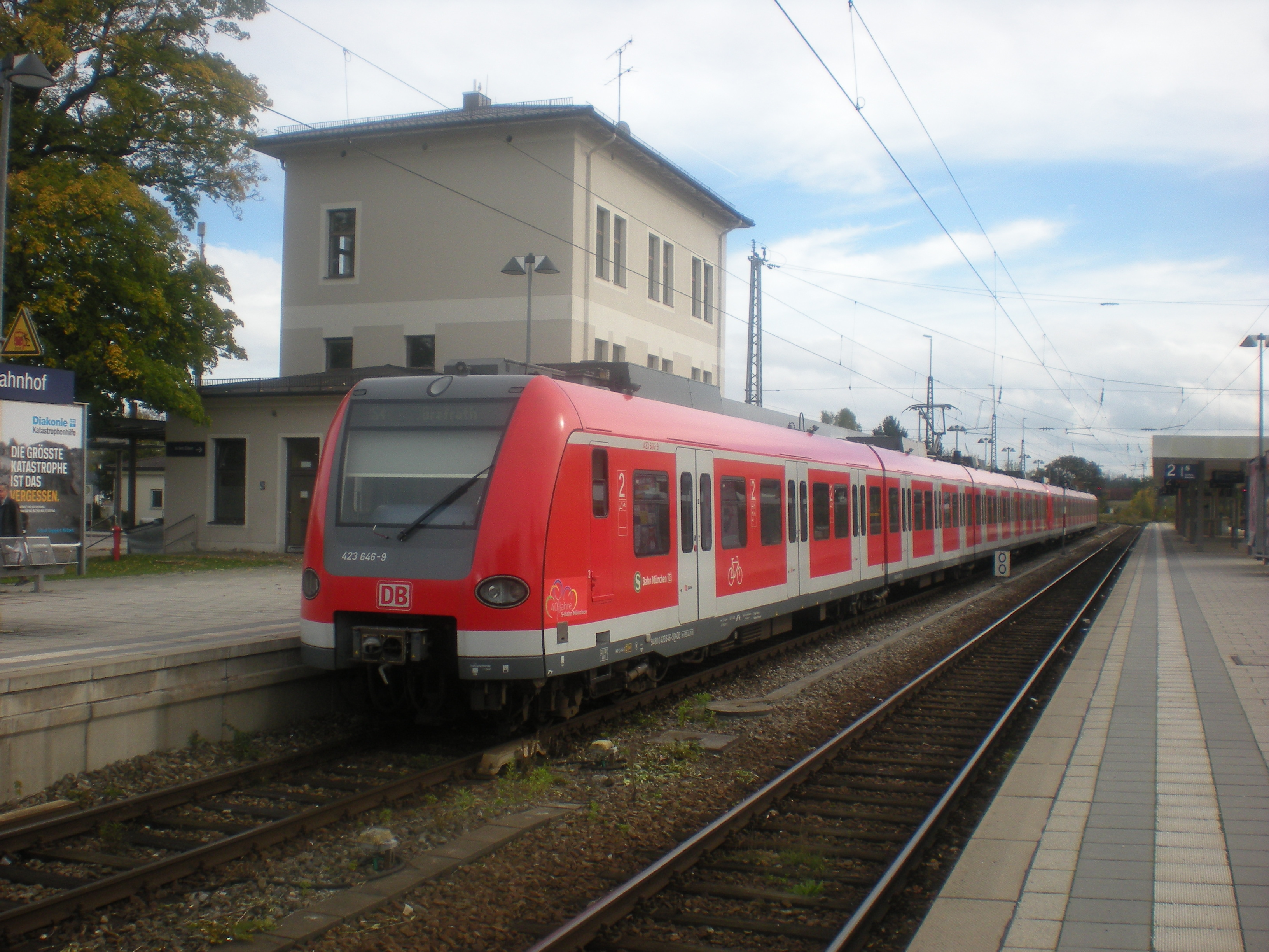 S-Bahn der Linie S4 in Richtung Grafrath am Grafinger Bahnhof